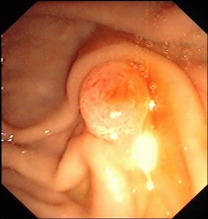 Unauffällige Papilla vateri Albertinen-Krankenhaus Hamburg II.Medizin 2006